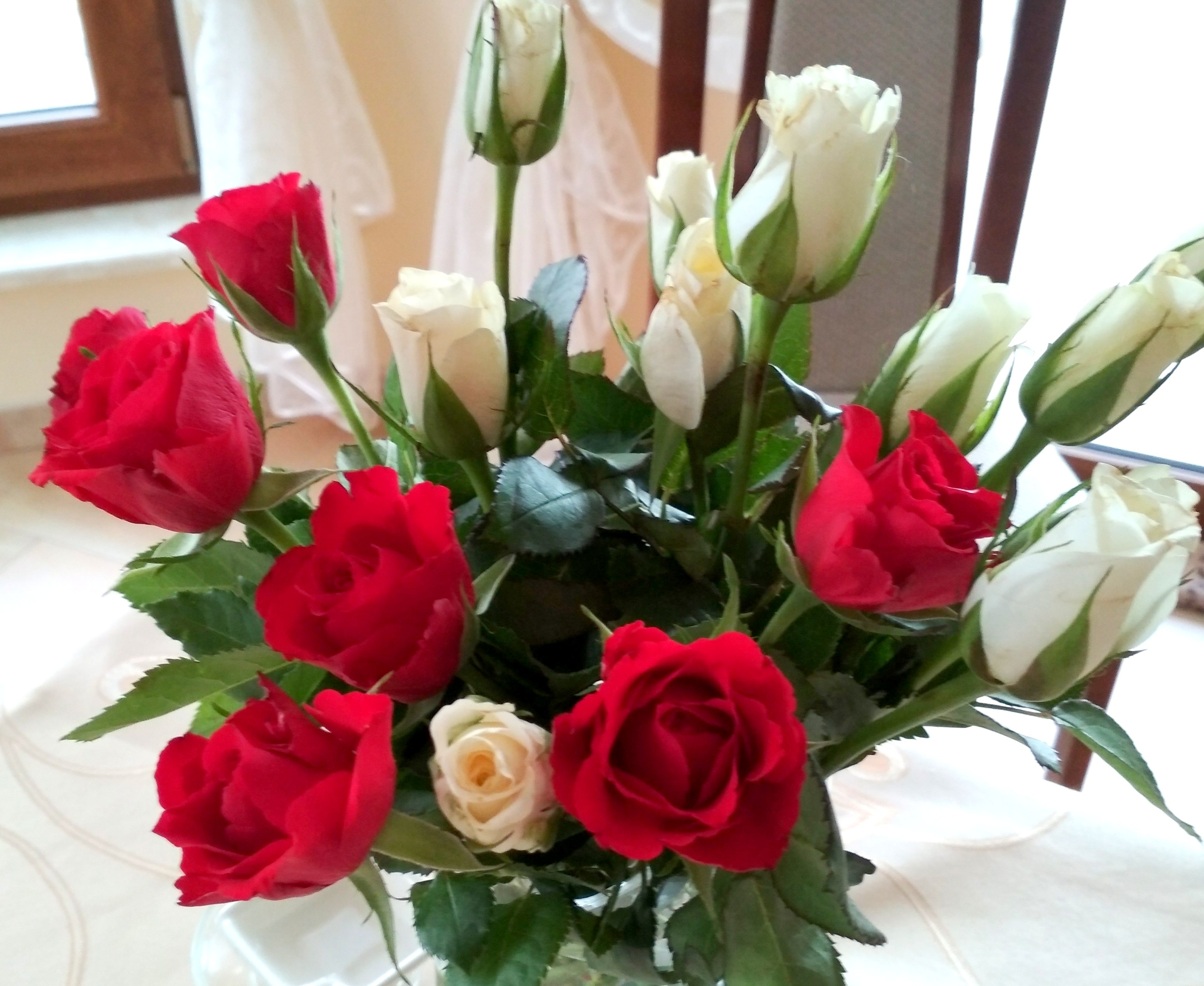 Bukiet biało-czerwonych róż